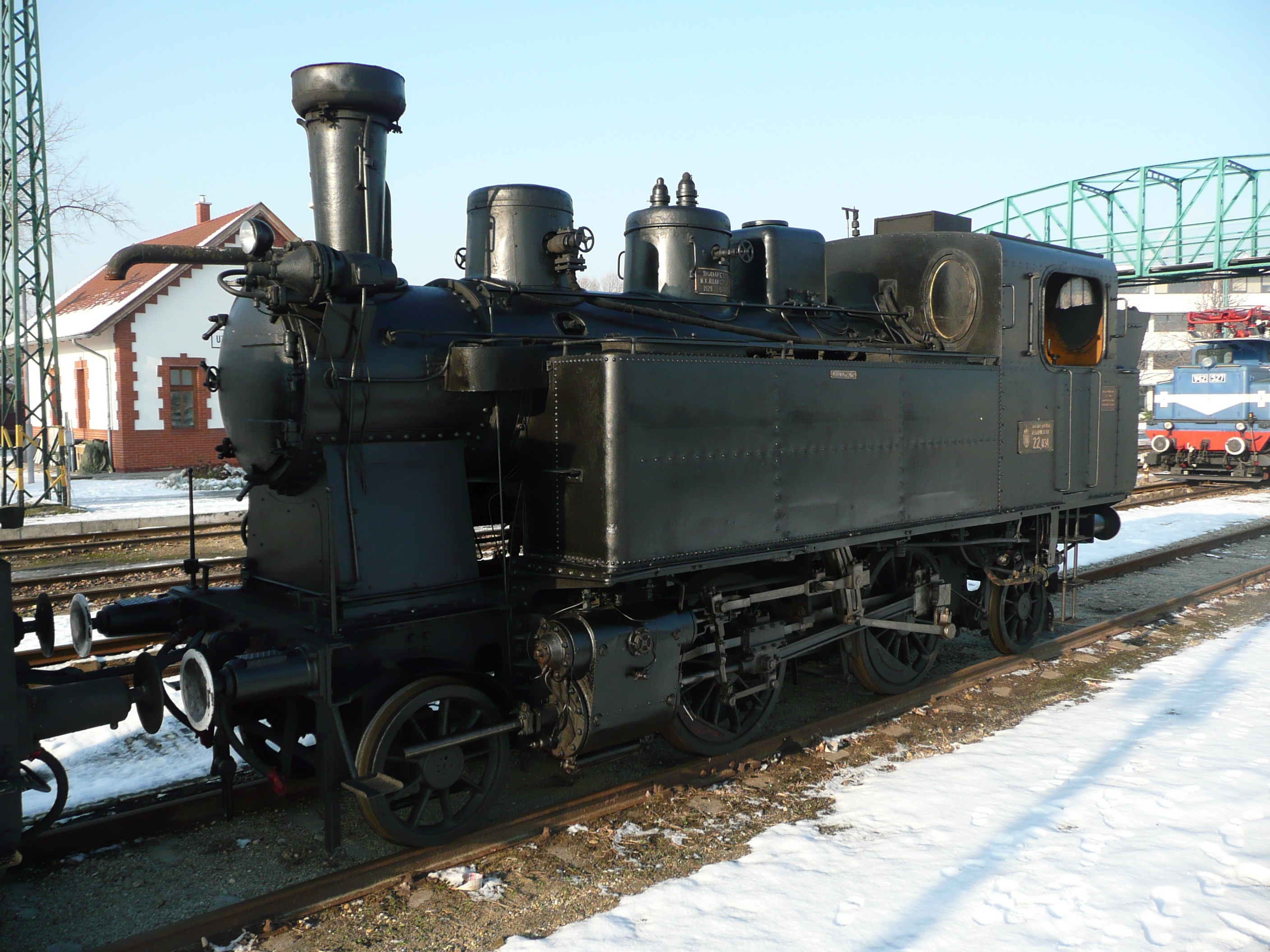 Tenderlokomotive 22.034 abgestellt im Bahnpark Budapest